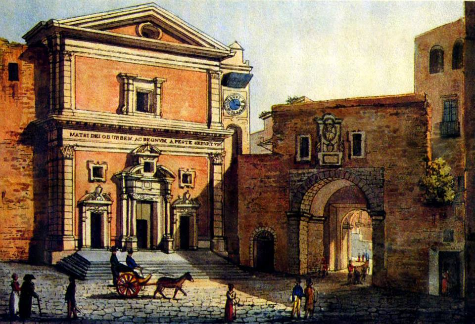 Napoli - Chiesa di Santa Maria di Costantinopoli ed annessa Porta di Costantinopoli (distrutta nel 1852).